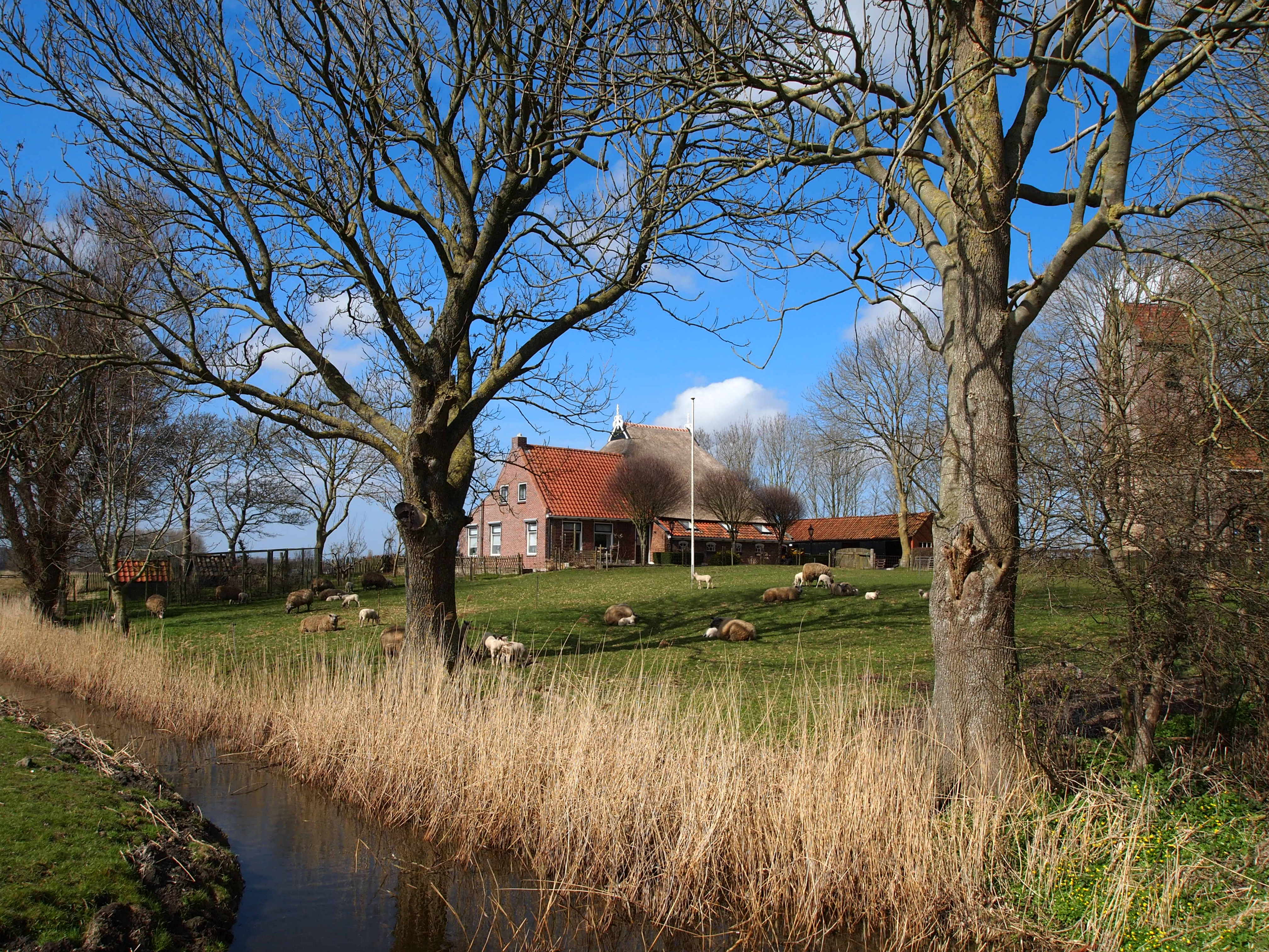 Boerderij op de Terp van Jouswier